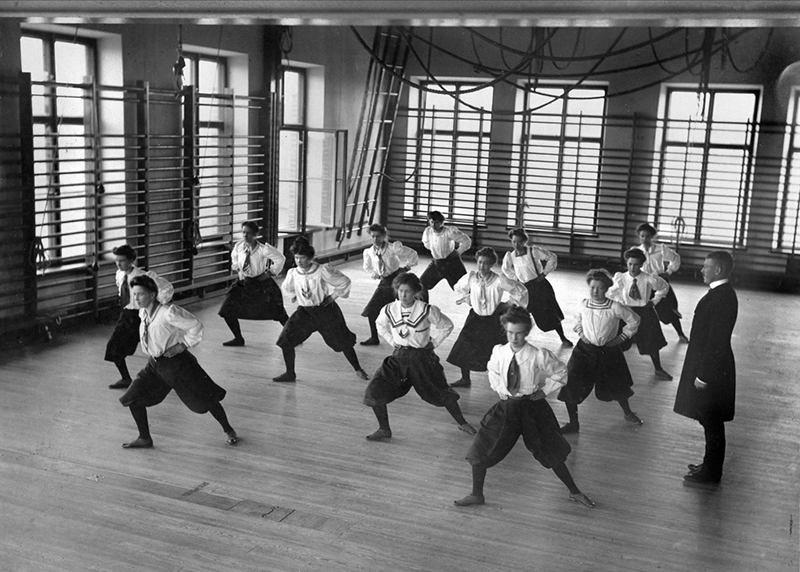 Gymnastik. Flickor i vita blusar och vida svarta knäbyxor gymnastiserar under överinseende av en manlig lärare. Nya Flickskolan, Sala